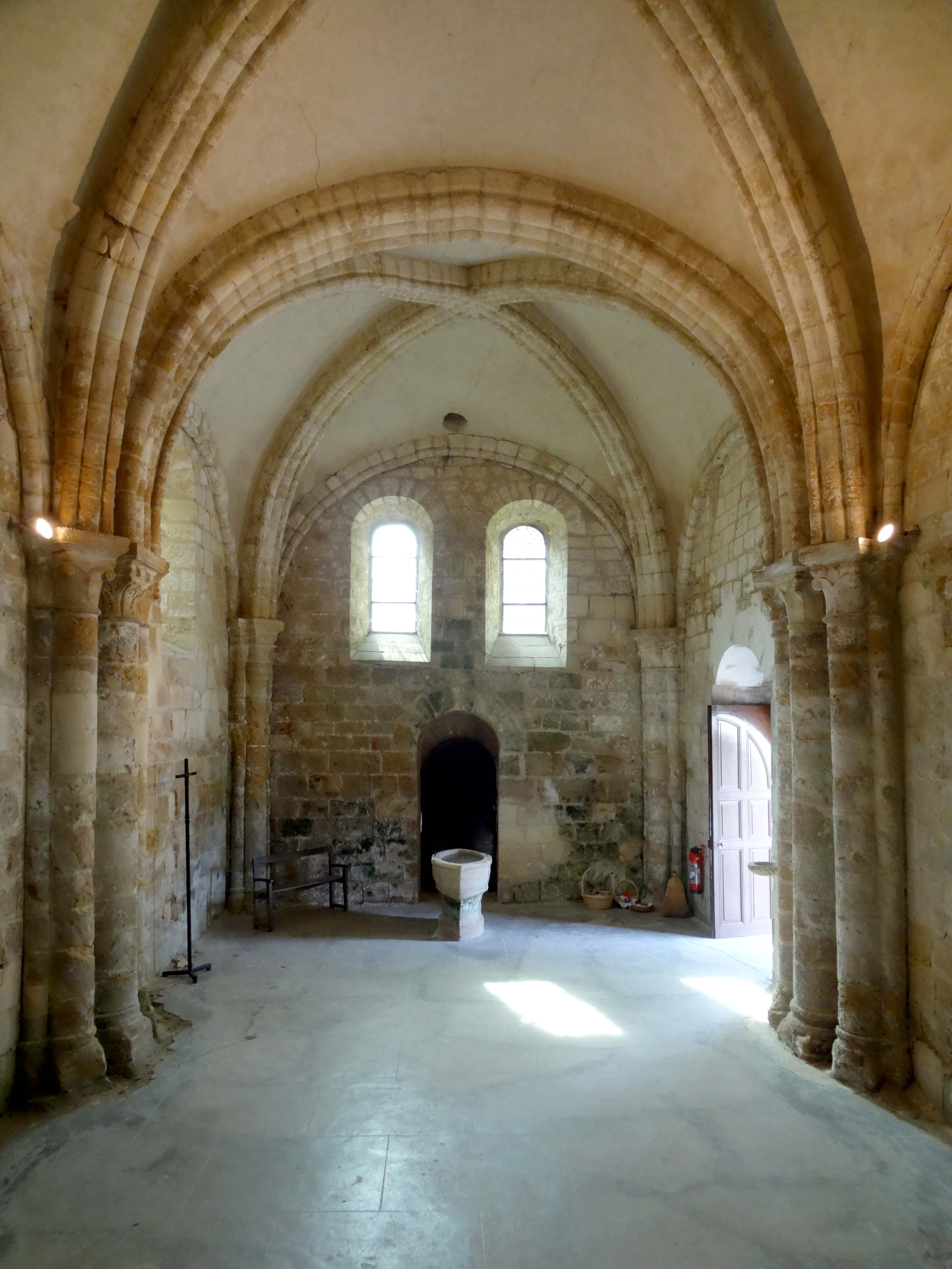 Intérieur de l'église - voir titre.